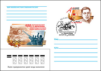 Художественный конверт с оригинальной маркой «100 лет со дня рождения И. К. Воропаева», «Белпочта». 2005.